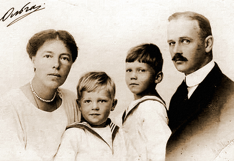 Фото Великой княжны Ольги Александровны с семьёй